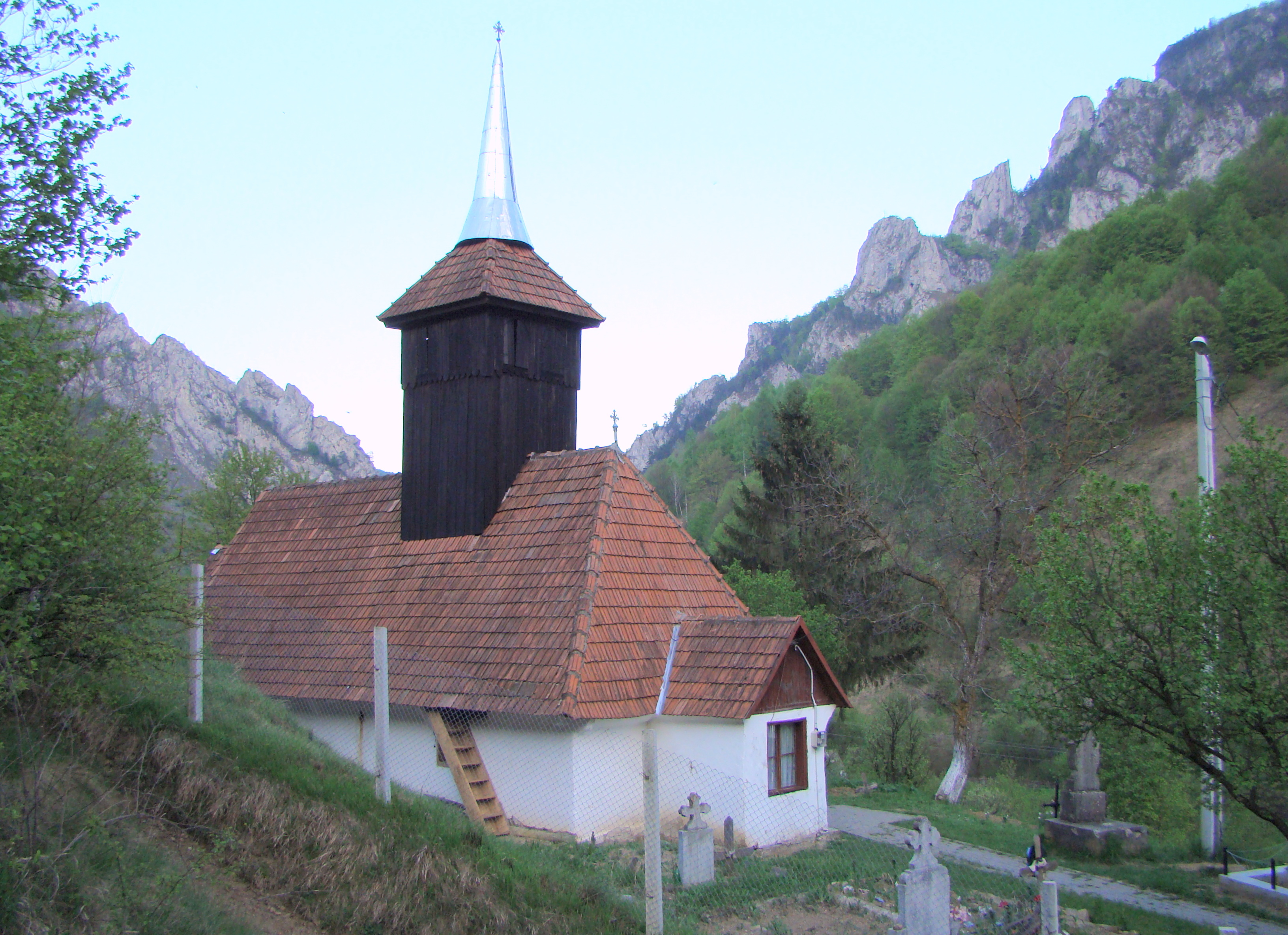 Biserica de lemn din Întregalde